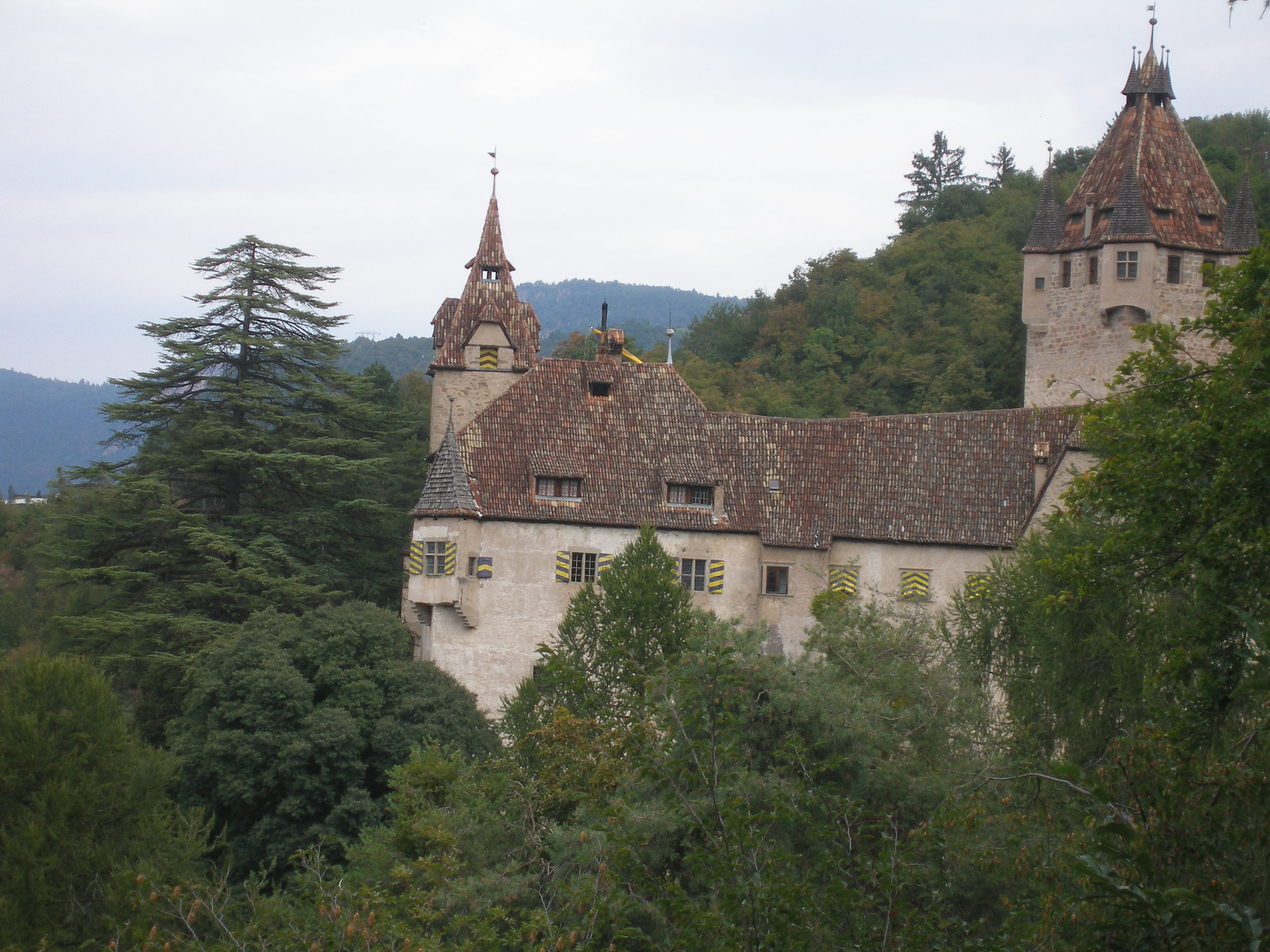 Schloss Enn bei Montan in Südtirol